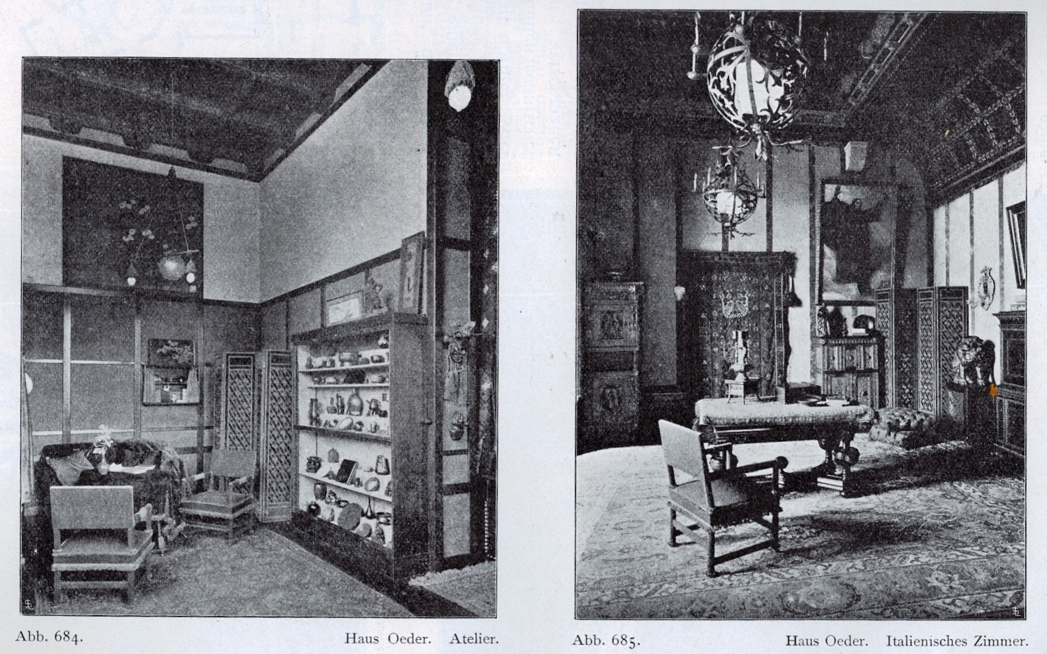 Haus Oeder Jacobistraße, Düsseldorf erbaut 1873 v. Baumeister Lorenz Schillmann,1894 umgebaut v. Jacobs & Wehling,_Atelier_und_Italienisches_Zimmer.jpg